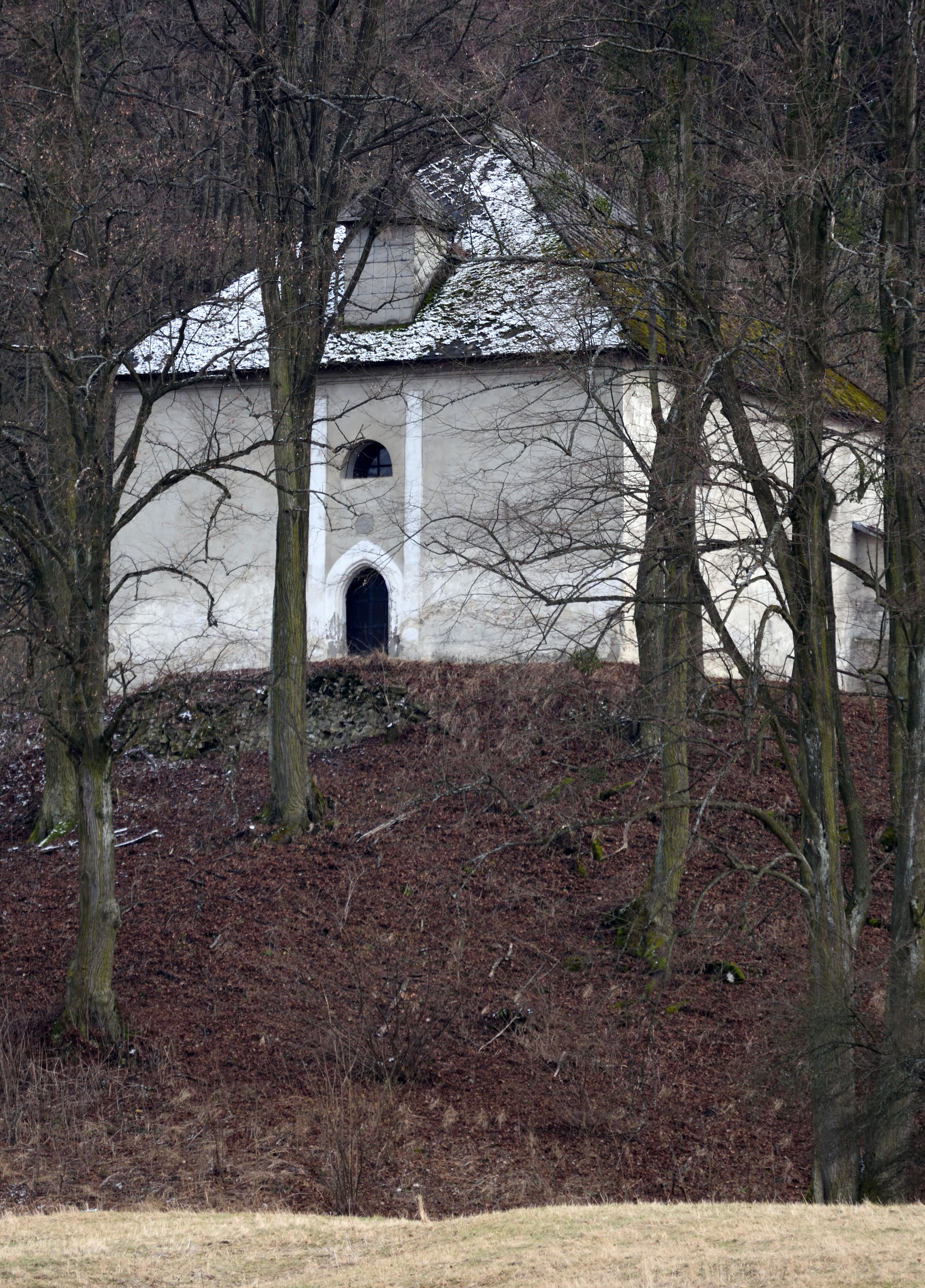 Kostol sv. Andreja, Sebeslavce, Blatnica, okres Martin. Object location48° 57′ 03.69″ N, 18° 56′ 46.62″ E